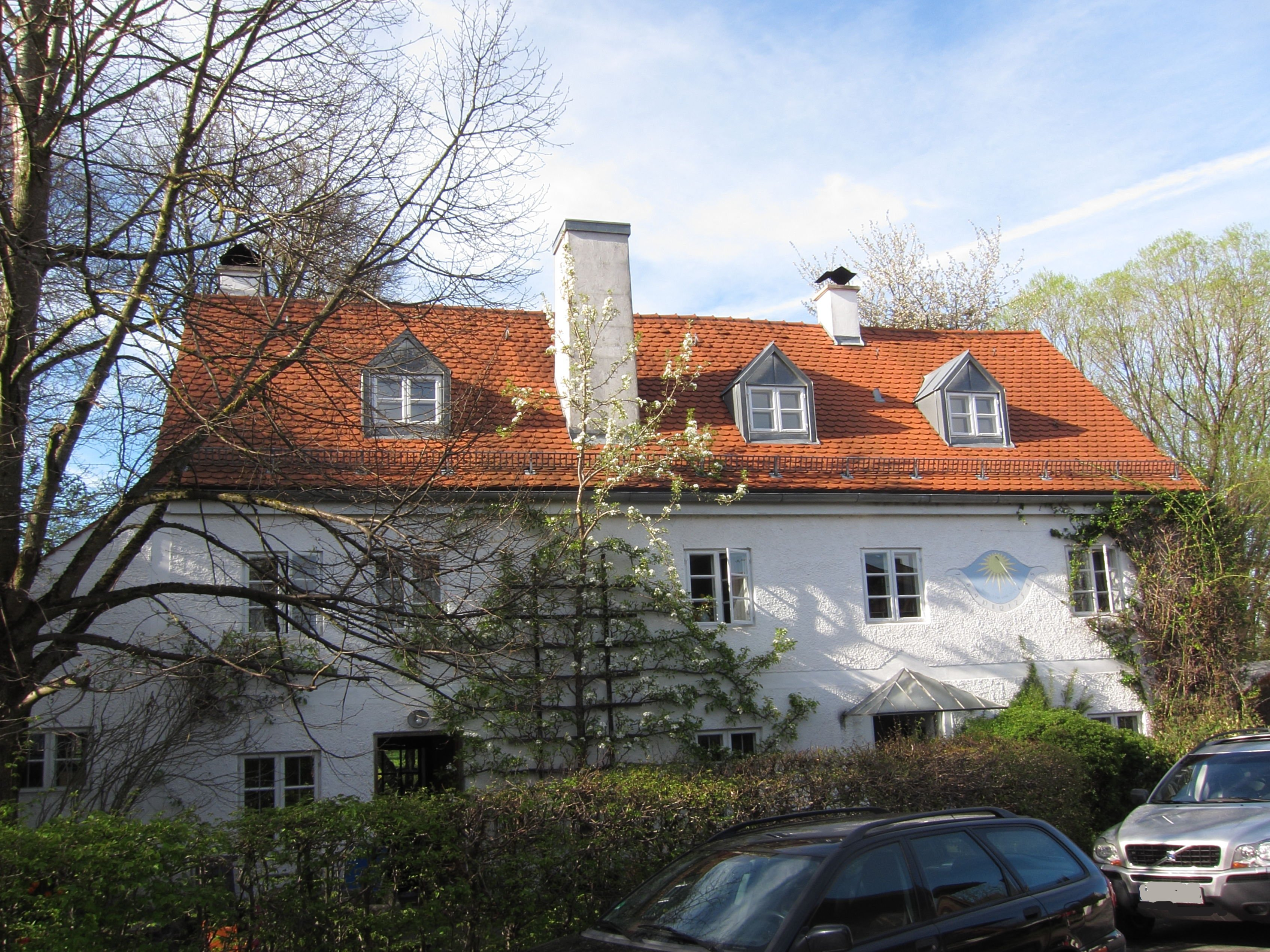 Hammerschmiede 19; ehem. Hammerschmiede, jetzt Wohnhaus; Satteldachbau, ursprünglich 1664 errichtet, wohl 1757 nach Brand neu erbaut, Äußeres 2. Viertel 19. Jahrhundert; Reste der technischen Einrichtung erhalten.